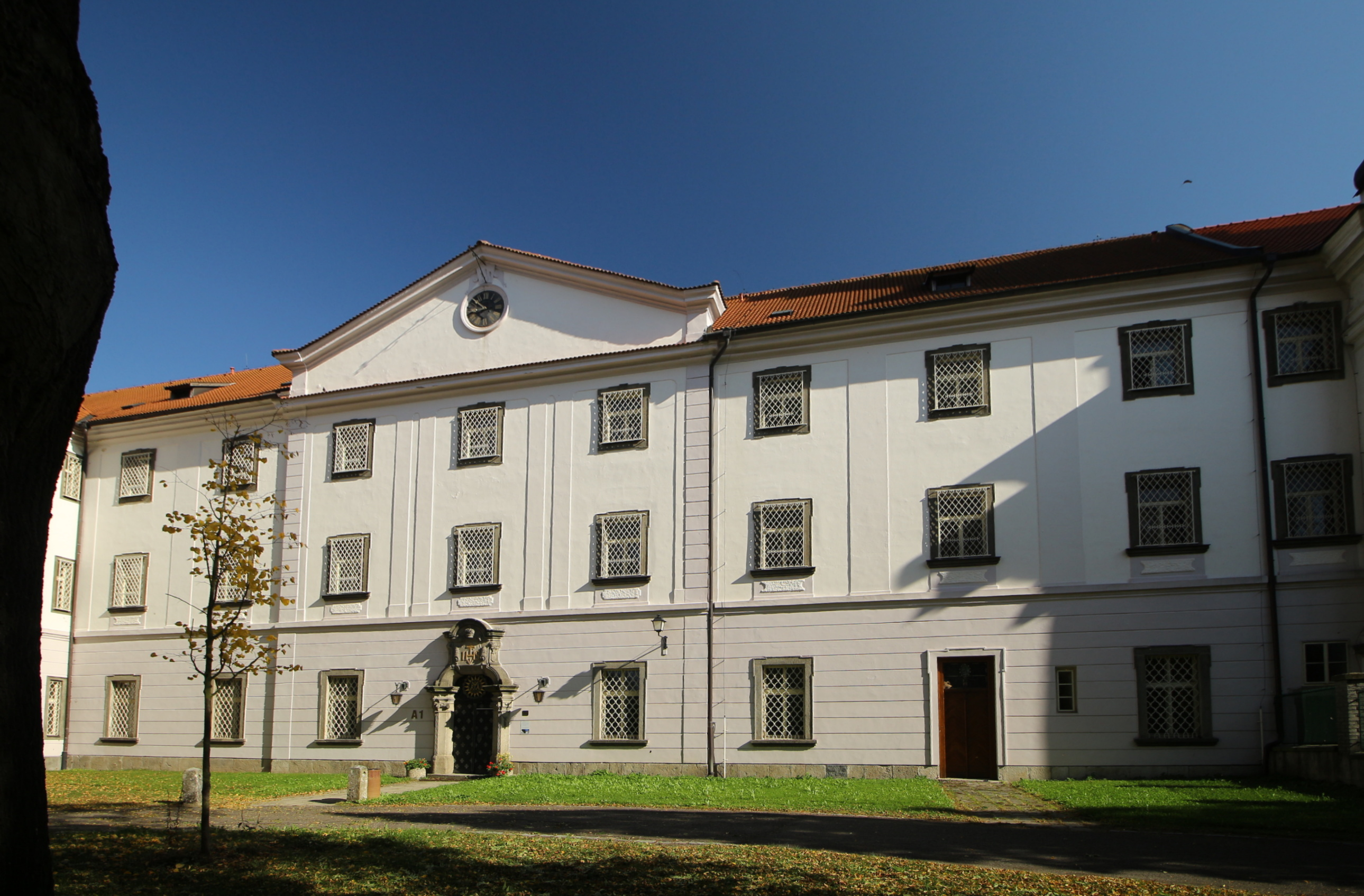 Opařany, okres Tábor